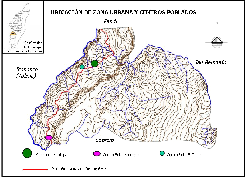 Centros Urbanos De Venecia